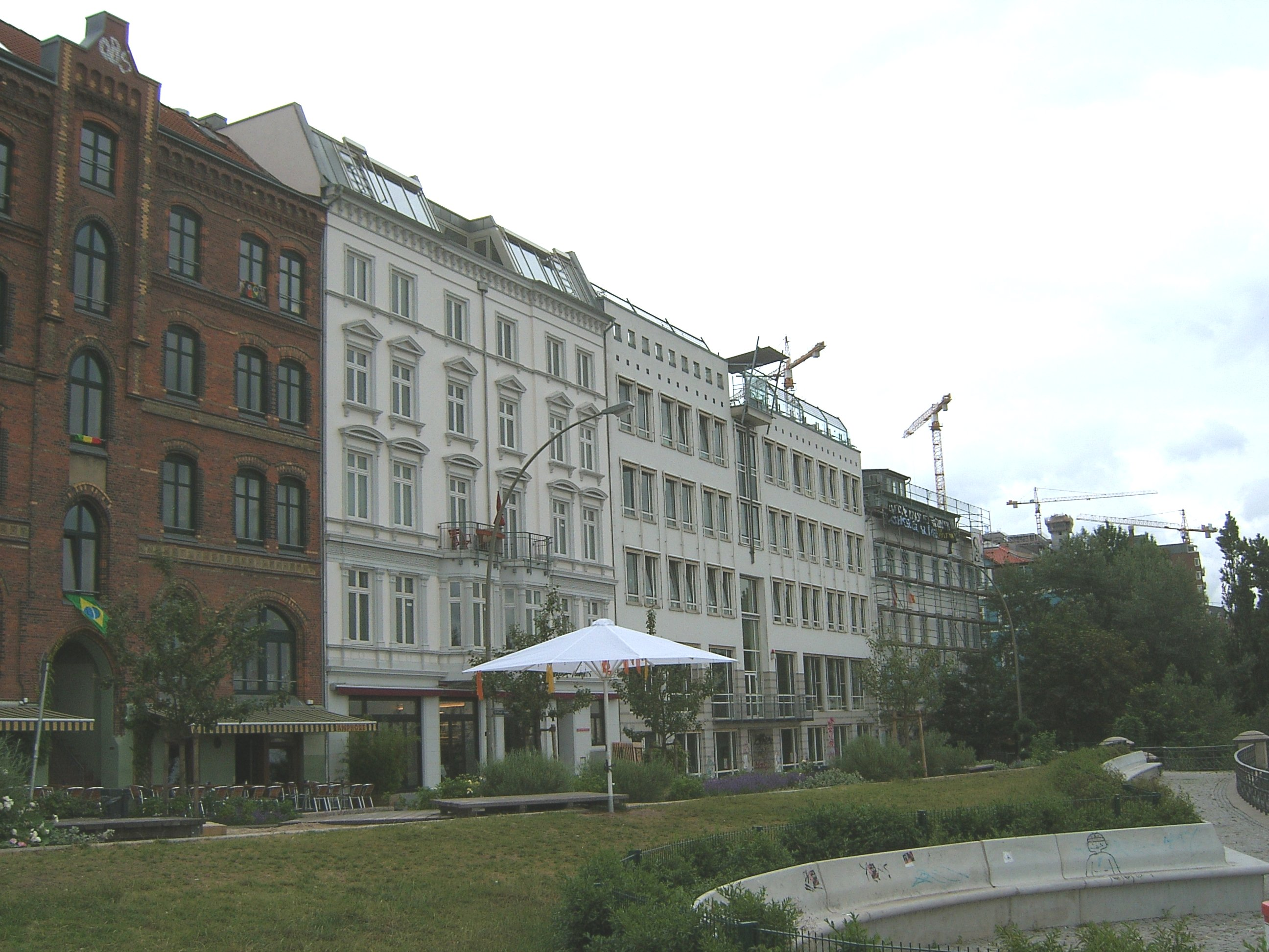 Neubauten an der St.Pauli Hafenstraße in Hamburg.